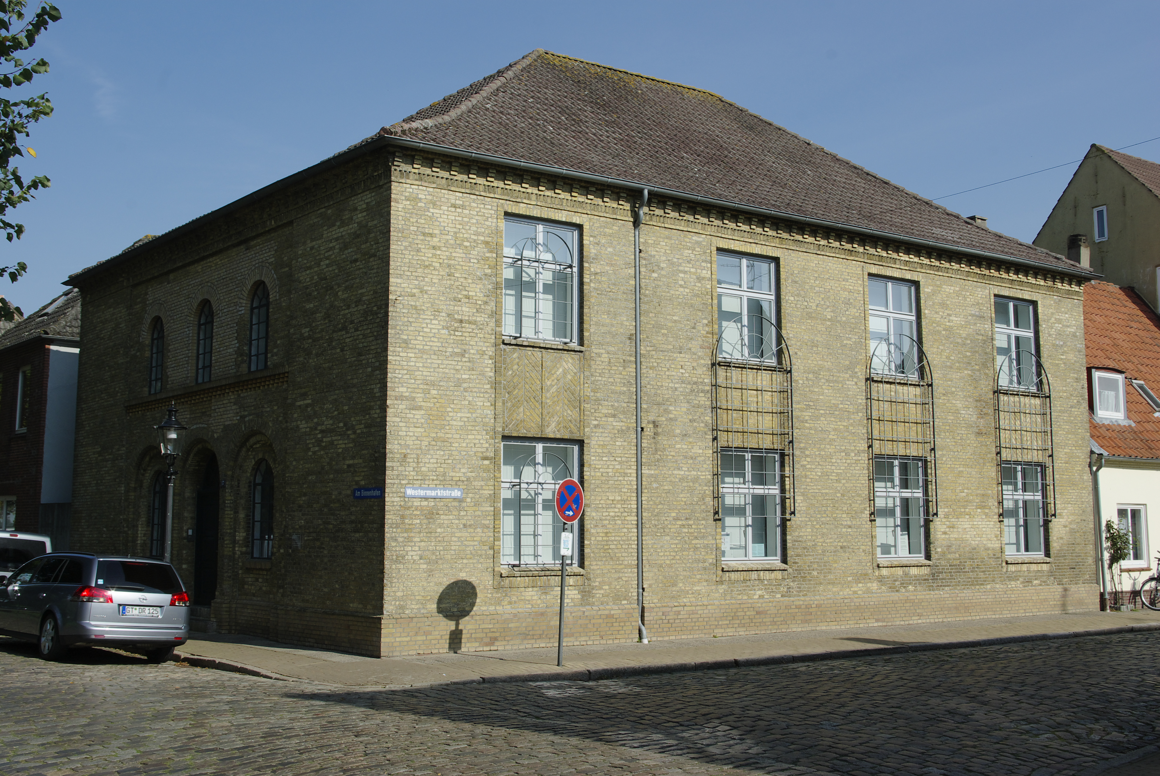 Kulturdenkmale in Friedrichstadt Nummer 2